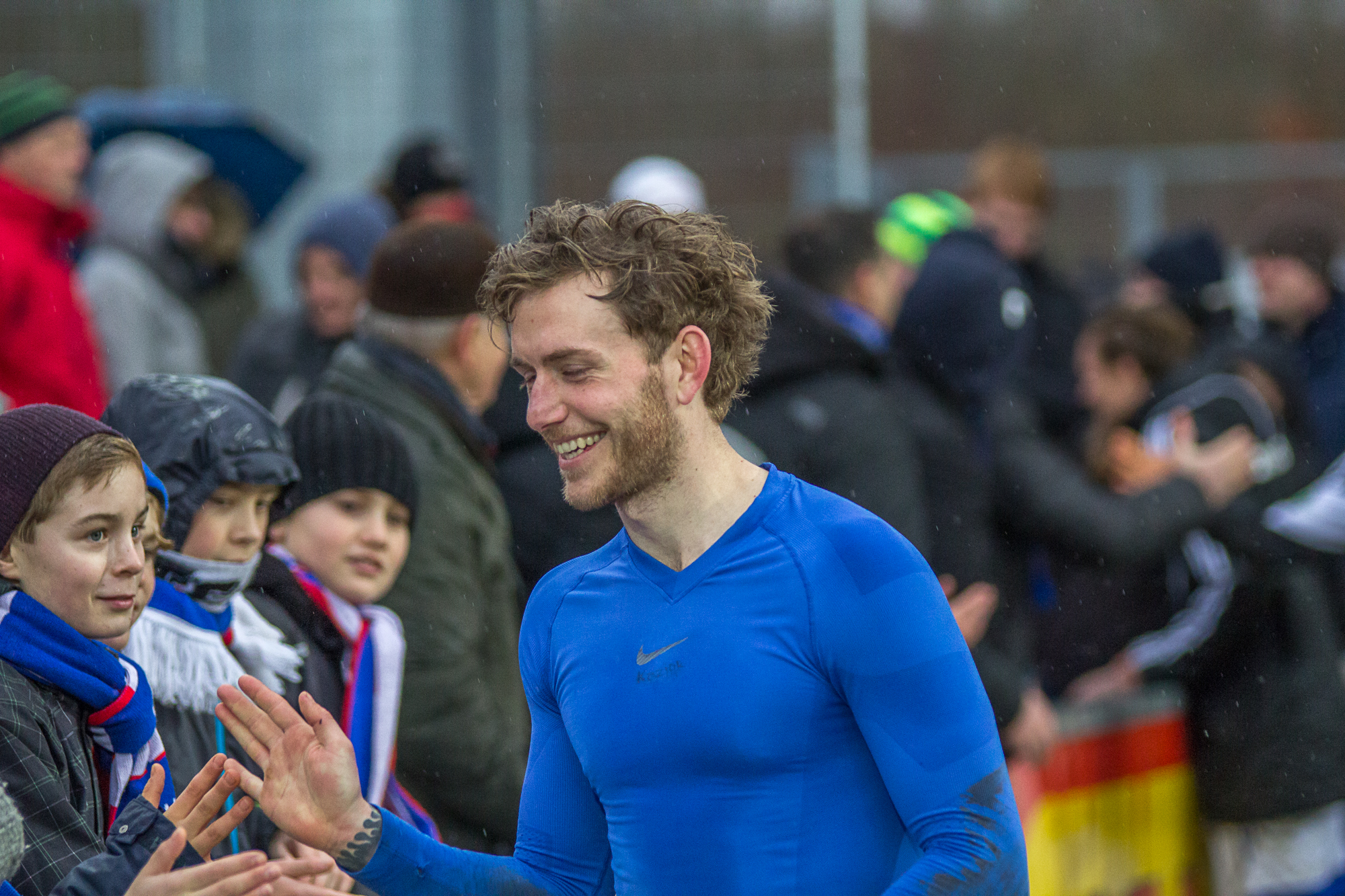 Mikkel Vendelbo